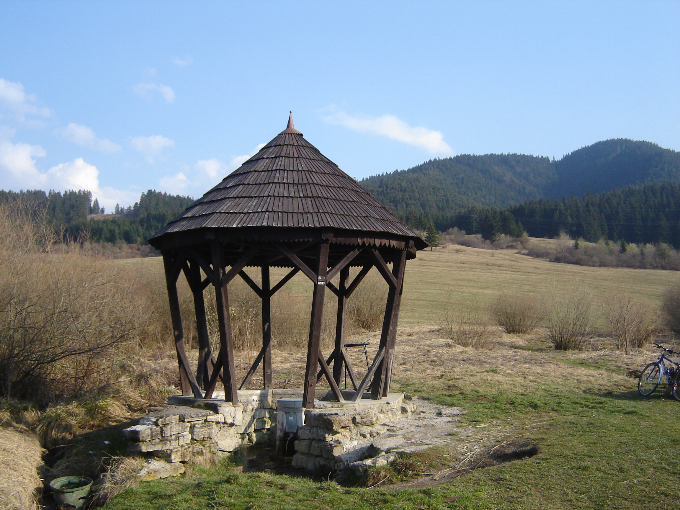 Prameň kyselky pri Ludrovej